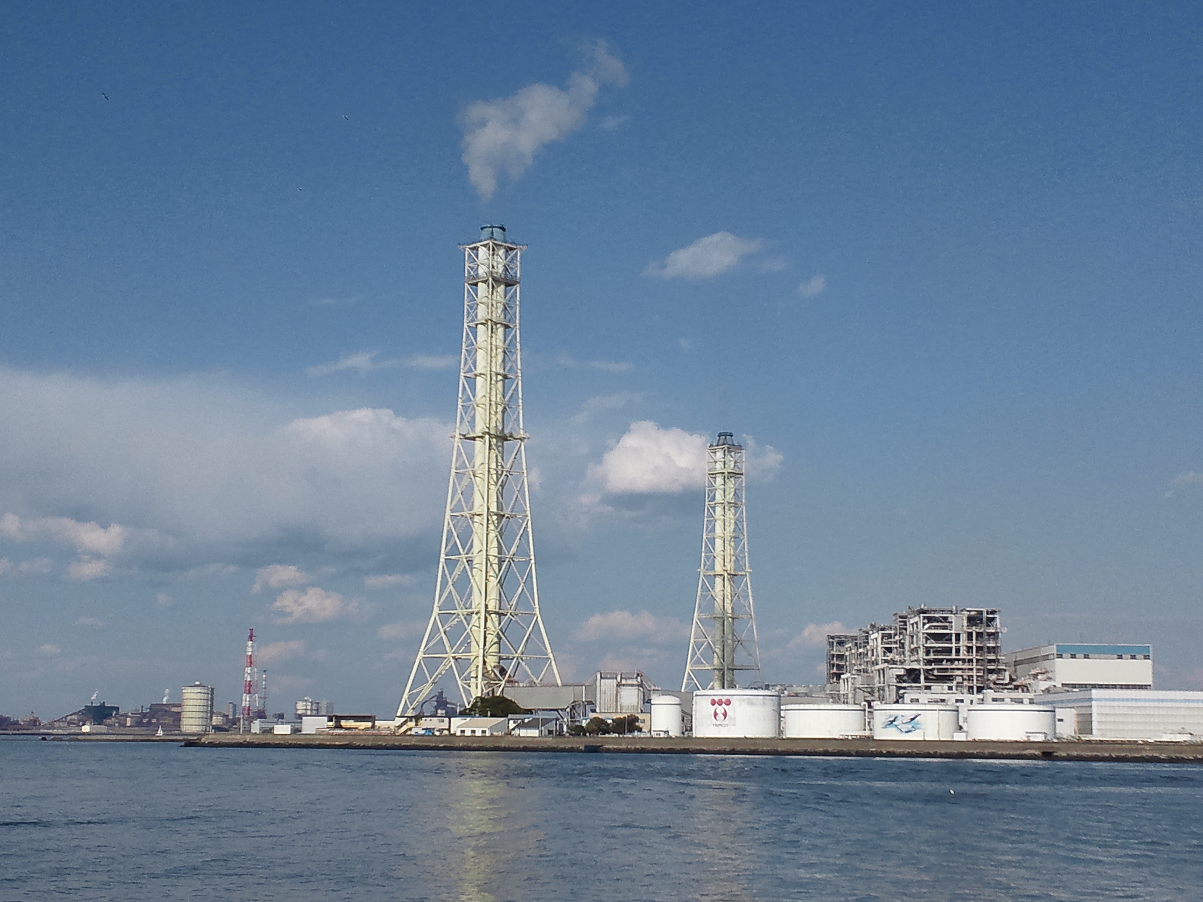 東京電力五井火力発電所